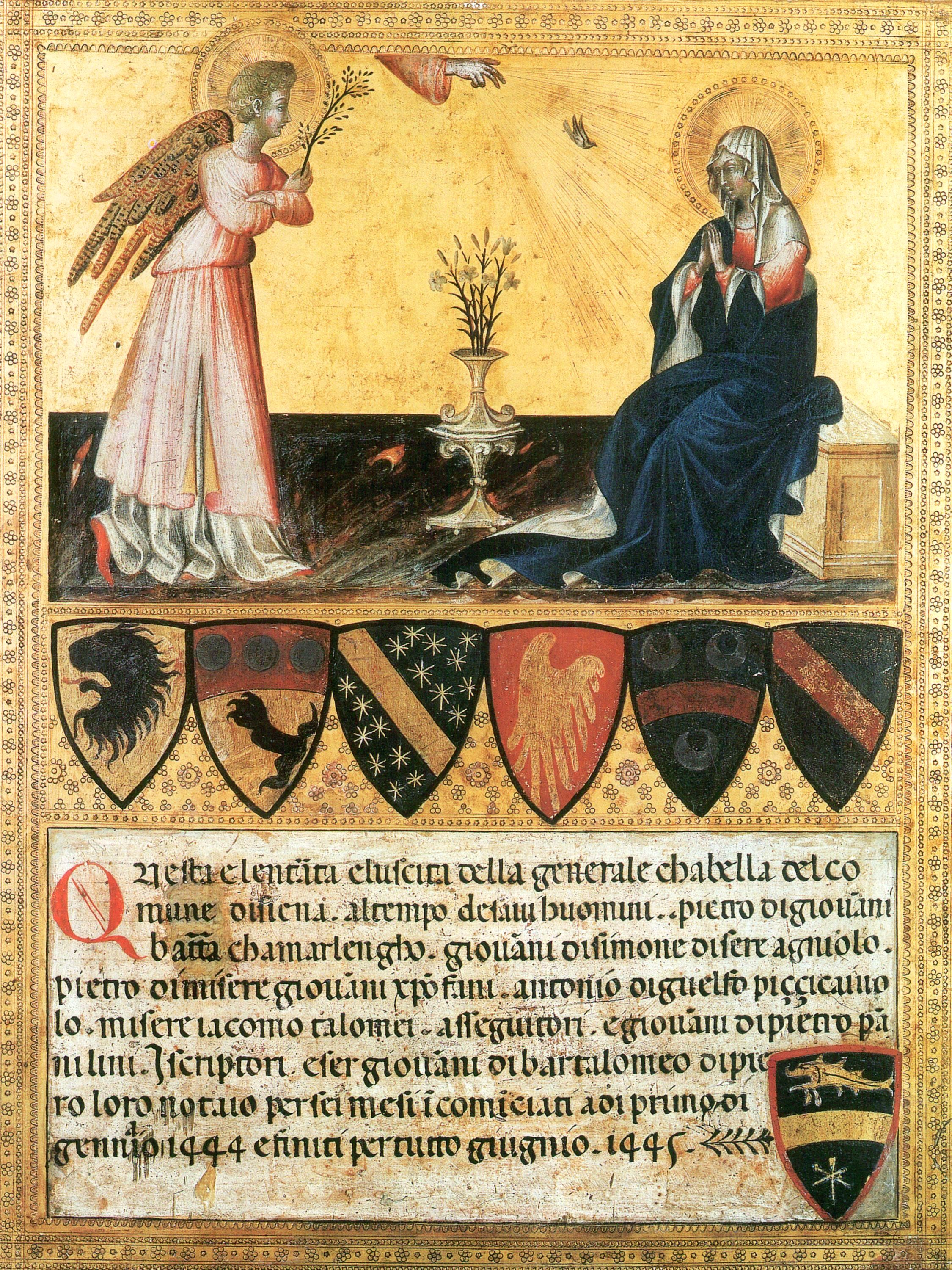 Annonciation. Giovanni di Paolo. Vatican